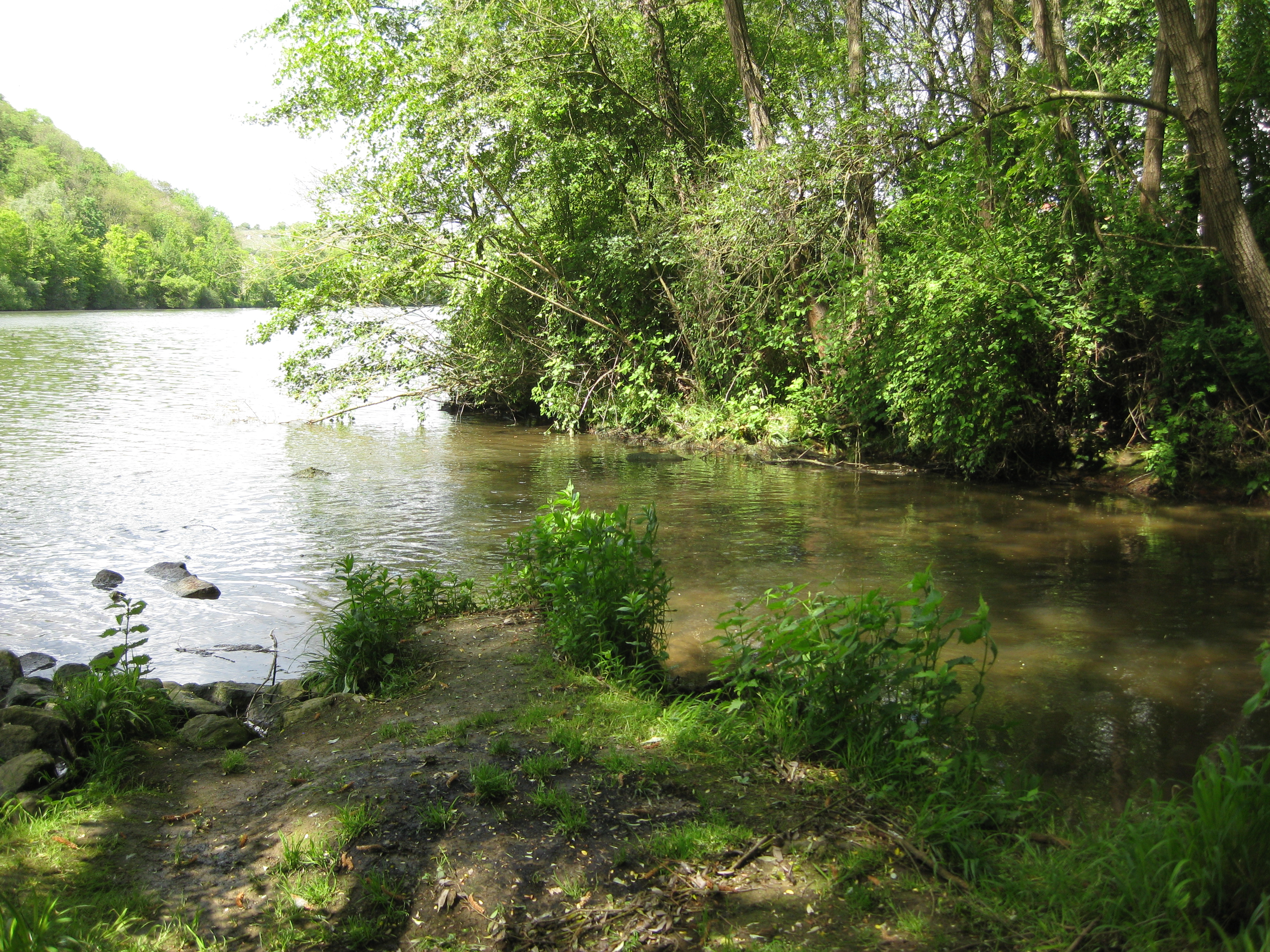 Mündungsbereich des Zipfelbach in den Neckar beim Stadtteil Poppenweiler der Stadt Ludwigsburg im Landkreis Ludwigsburg in Baden-Württemberg